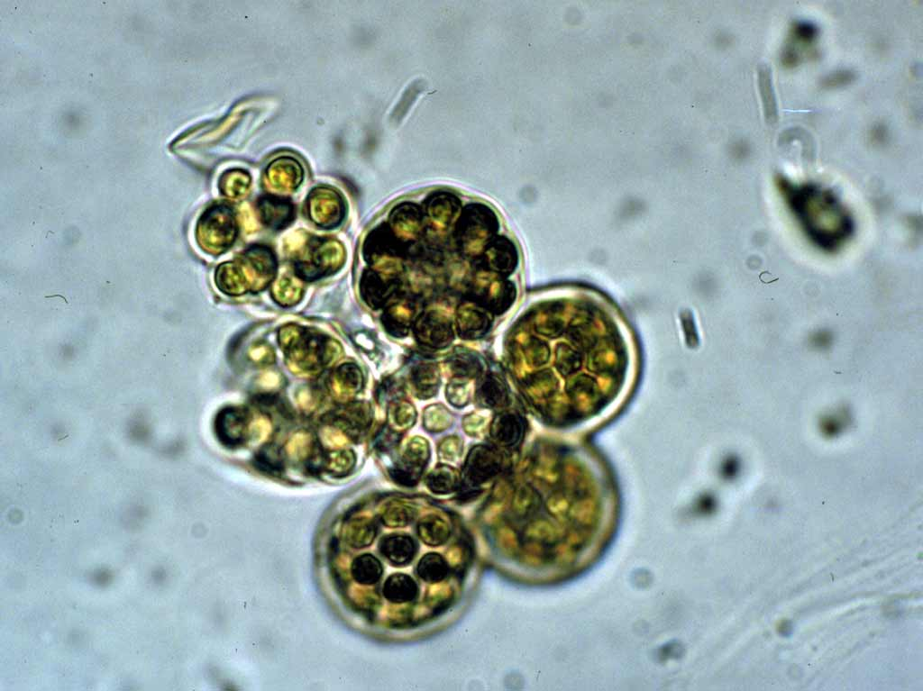 Coelastrum microporum